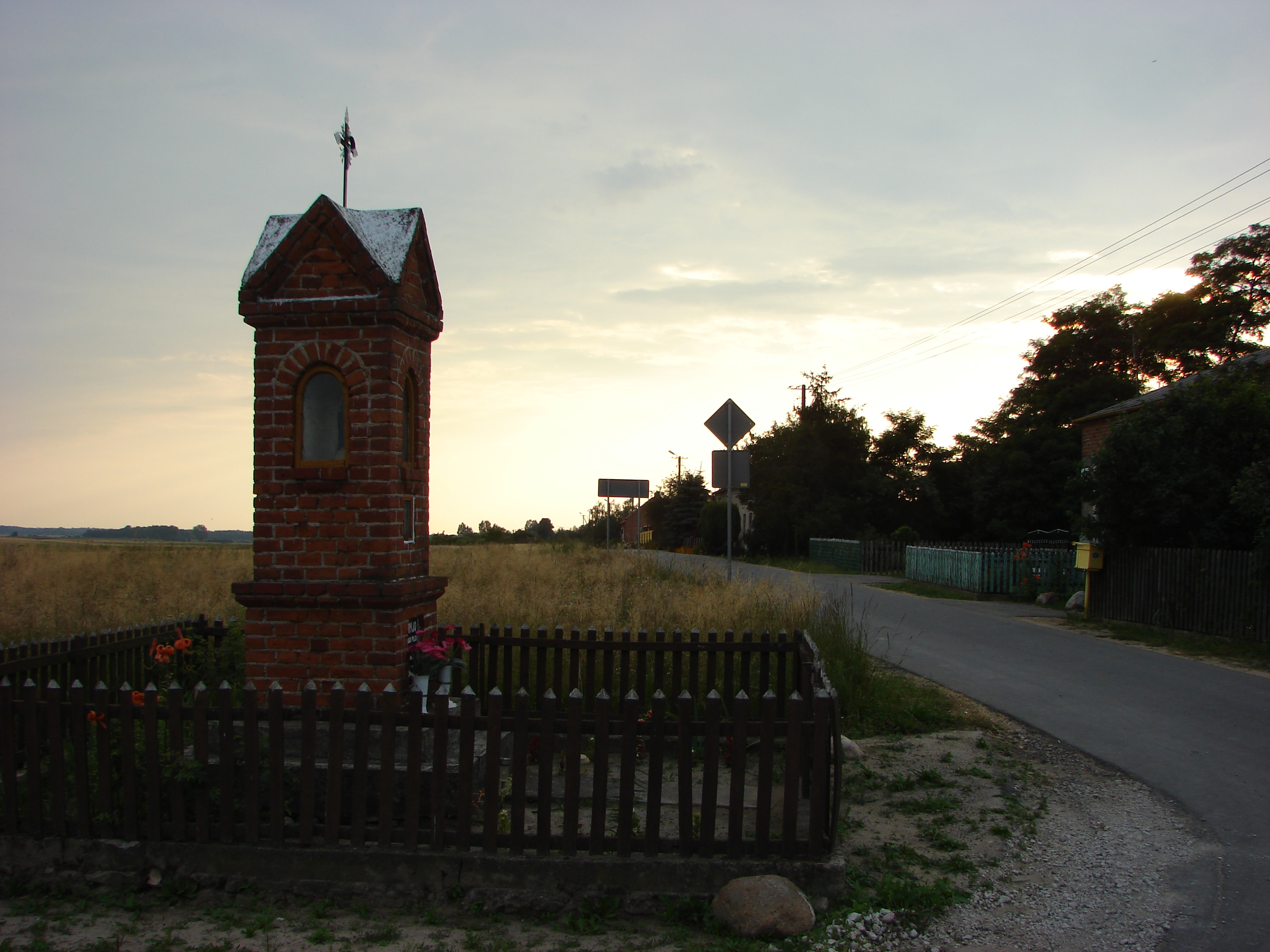 Strzygi, Gmina Chodecz, kapliczka